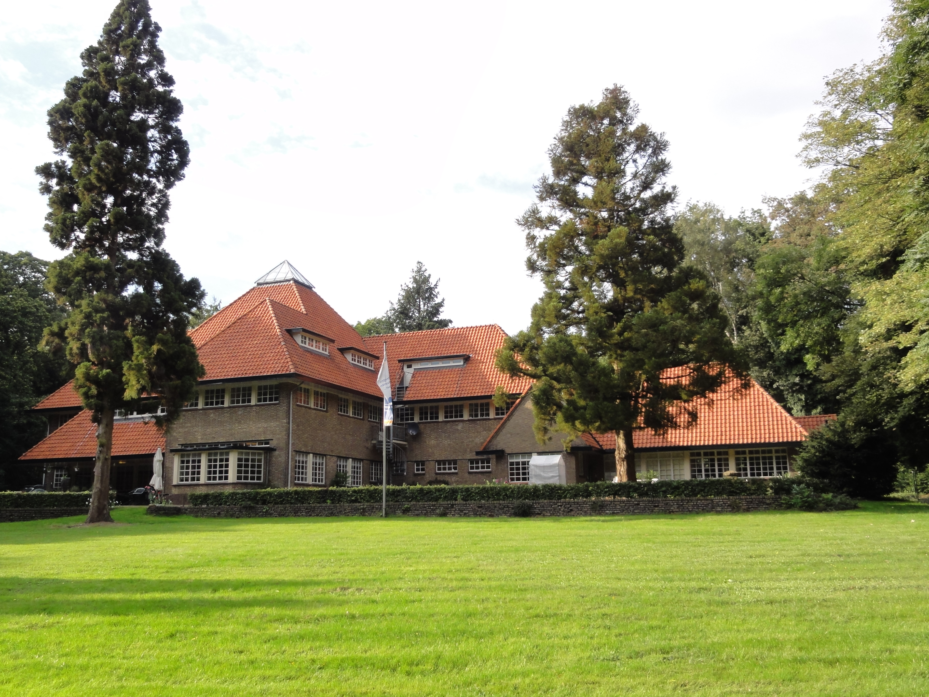 Nijmegen Rijksmonument 522997 Villandry 08″ N, 5° 52′ 27.4″ E Object location51° 49′ 36.7″ N, 5° 53′ 02.94″ E